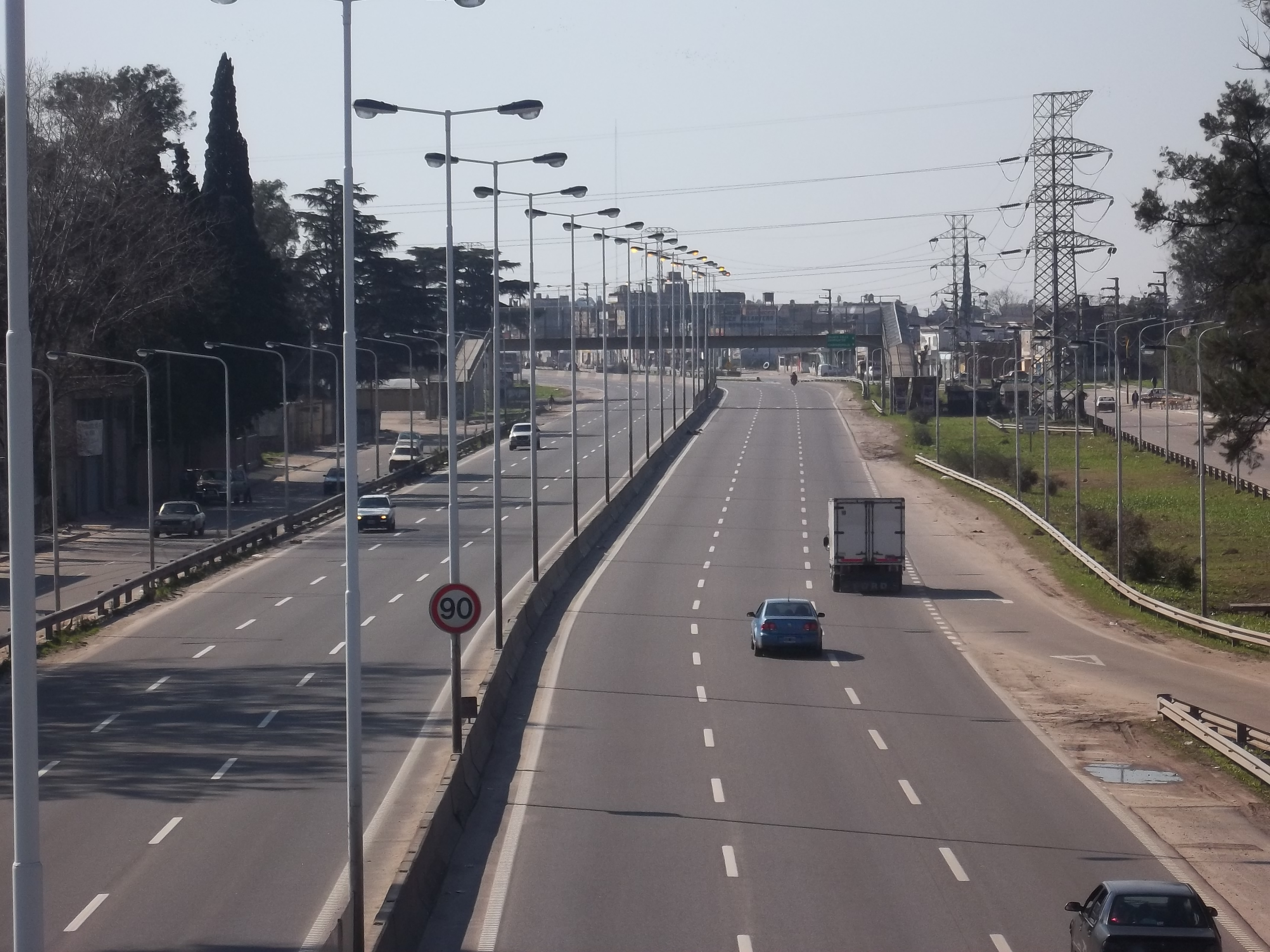 Ruta Nacional 3 en la intersección con la calle Dr. Enrique Simón Pérez en González Catán, partido de La Matanza, provincia de Buenos Aires, Argentina.